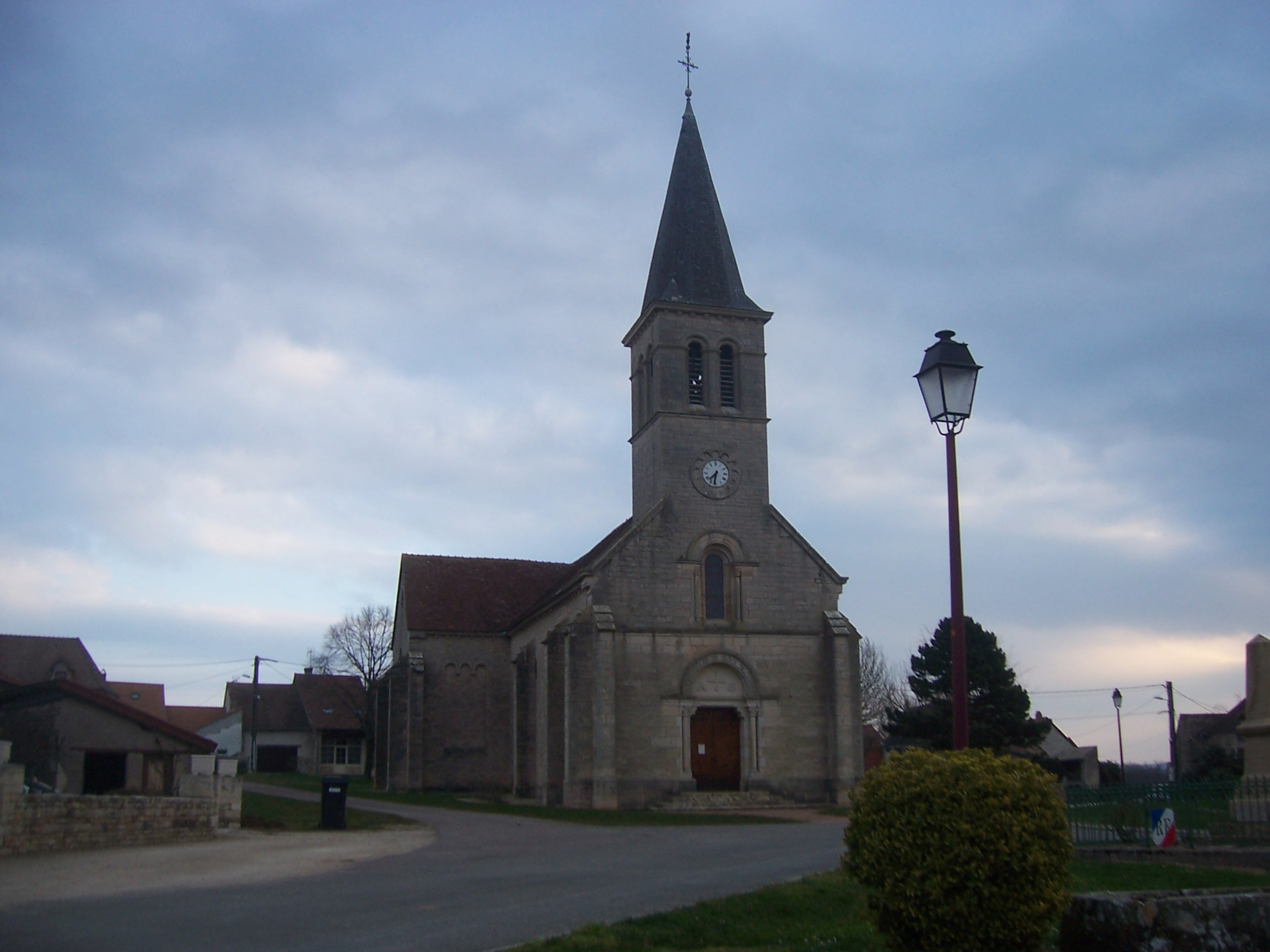 Eglise de Champagny-sous-Uxelles